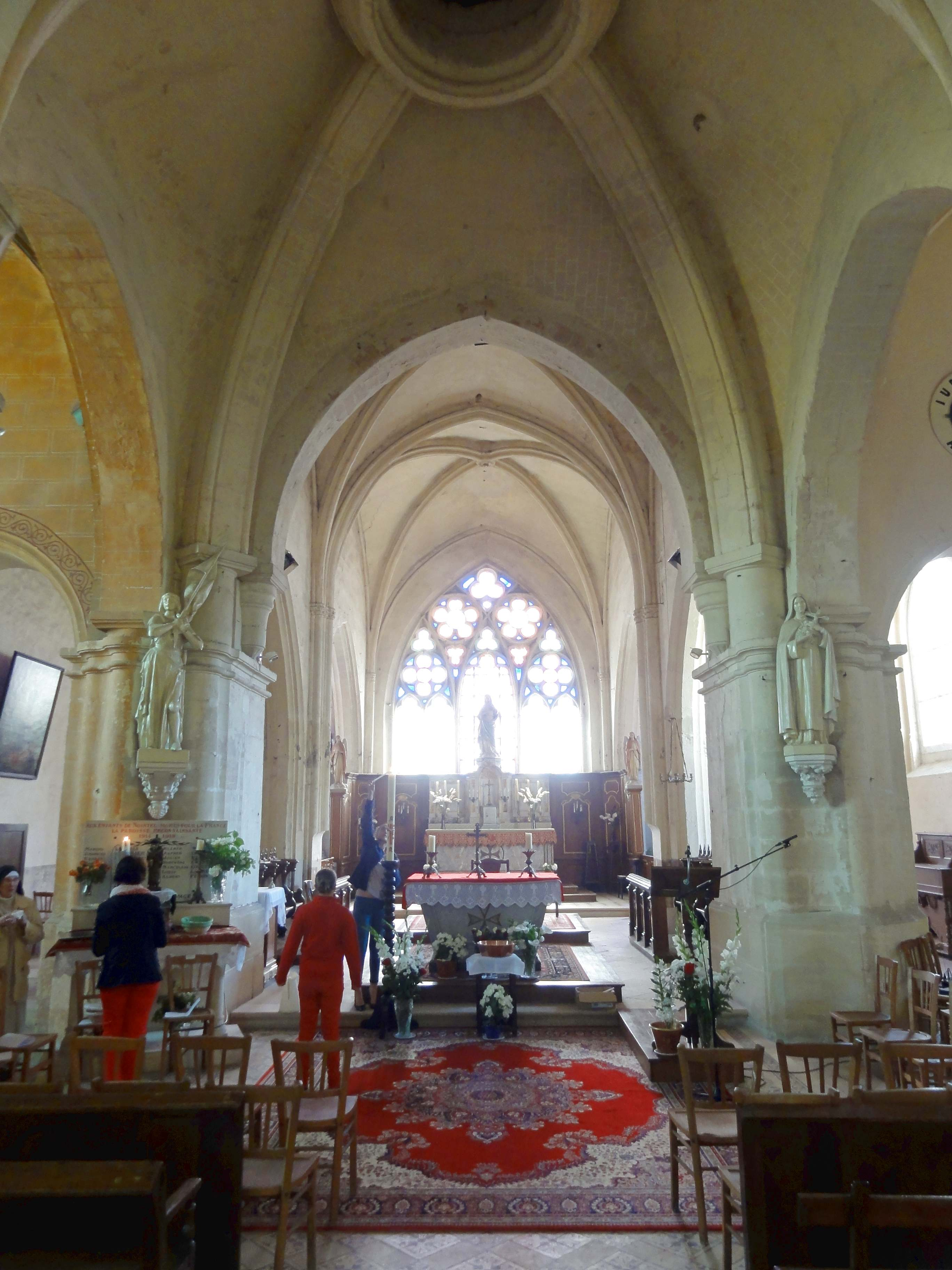 Intérieur de l'église Saint-Vaast de Nointel (voir titre).